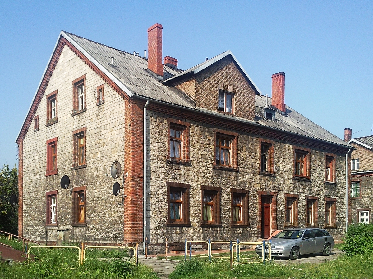 Osiedle górnicze przy ulicy Krzywej